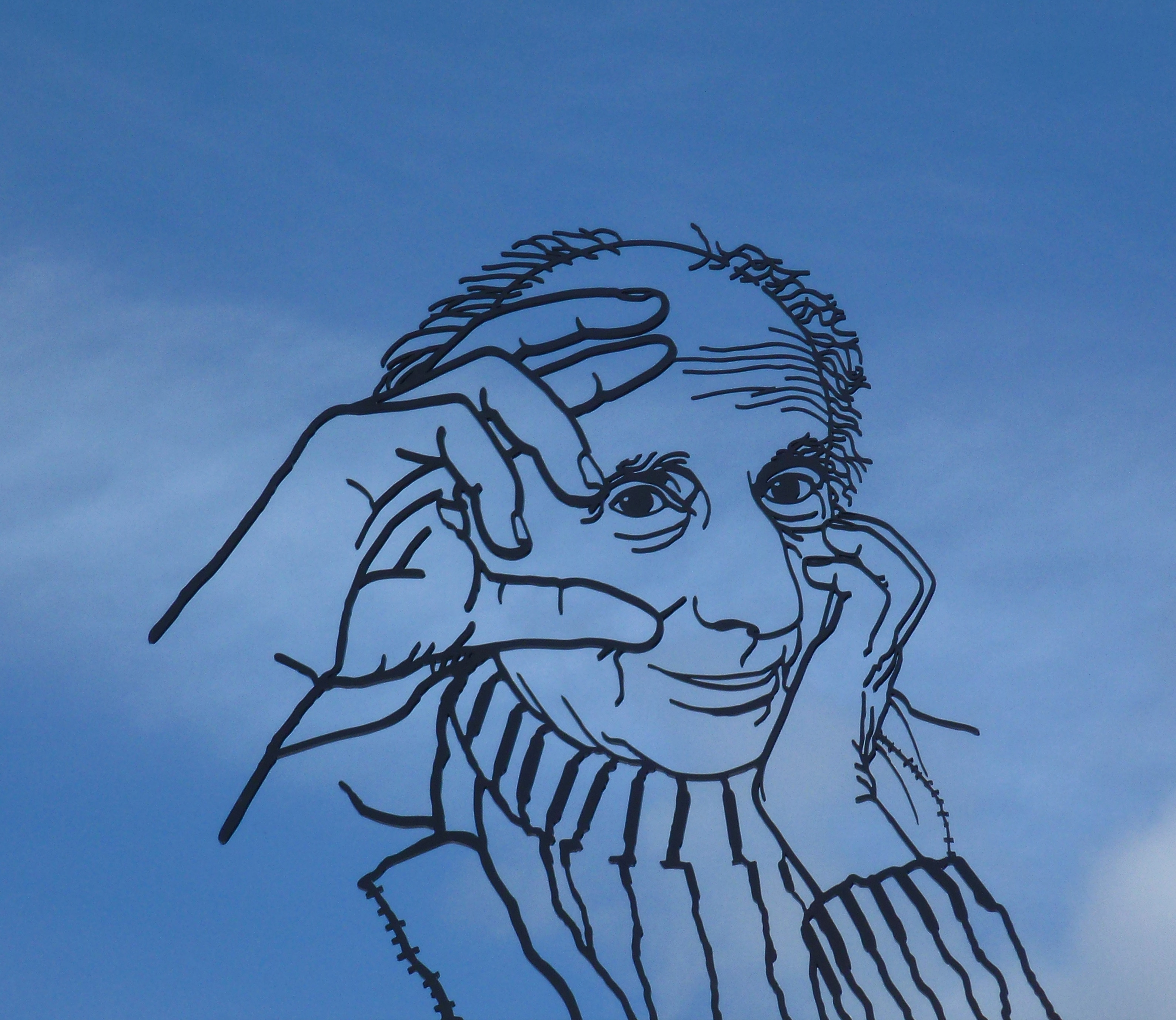 Kunstwerk Leo Vroman in Gouda, gemaakt door Jeroen Henneman is een portret uit staaldraad. Op 10 april 2015 zou Leo Vroman 100 jaar geworden zijn. Een gezegde van Leo Vroman was: Ik weet niet of ik de 100 haal, zo niet, vier dat dan toch maar. Ter gelegenheid daarvan werd in de Bibliotheek Gouda, in de voormalige Chocoladefabriek, een Vromannacht georganiseerd met daarbij de onthulling van een portret van Leo Vroman. Zijn afbeelding staat bovenop de Bibliotheek Gouda en voor de bibliotheek vind men informatie over het kunstwerk. Deze informatie staat in een klein plantsoen, oorspronkelijk ontworpen door Jan David Zocher jr.. Het plantsoen heeft in maart 2015, de naam Vromanpark gekregen.